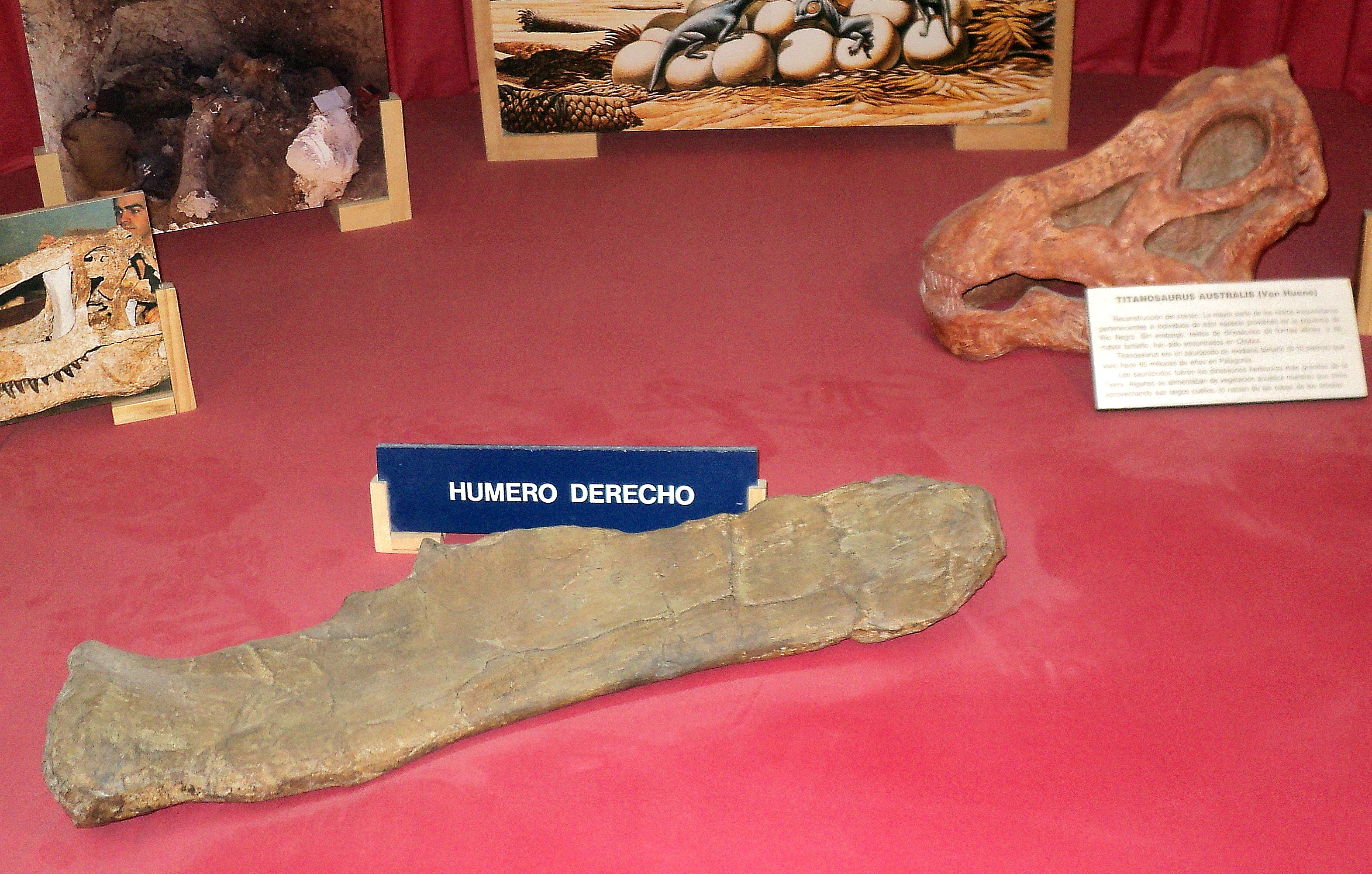 Fósiles de ejemplar de titanosaurus Australis